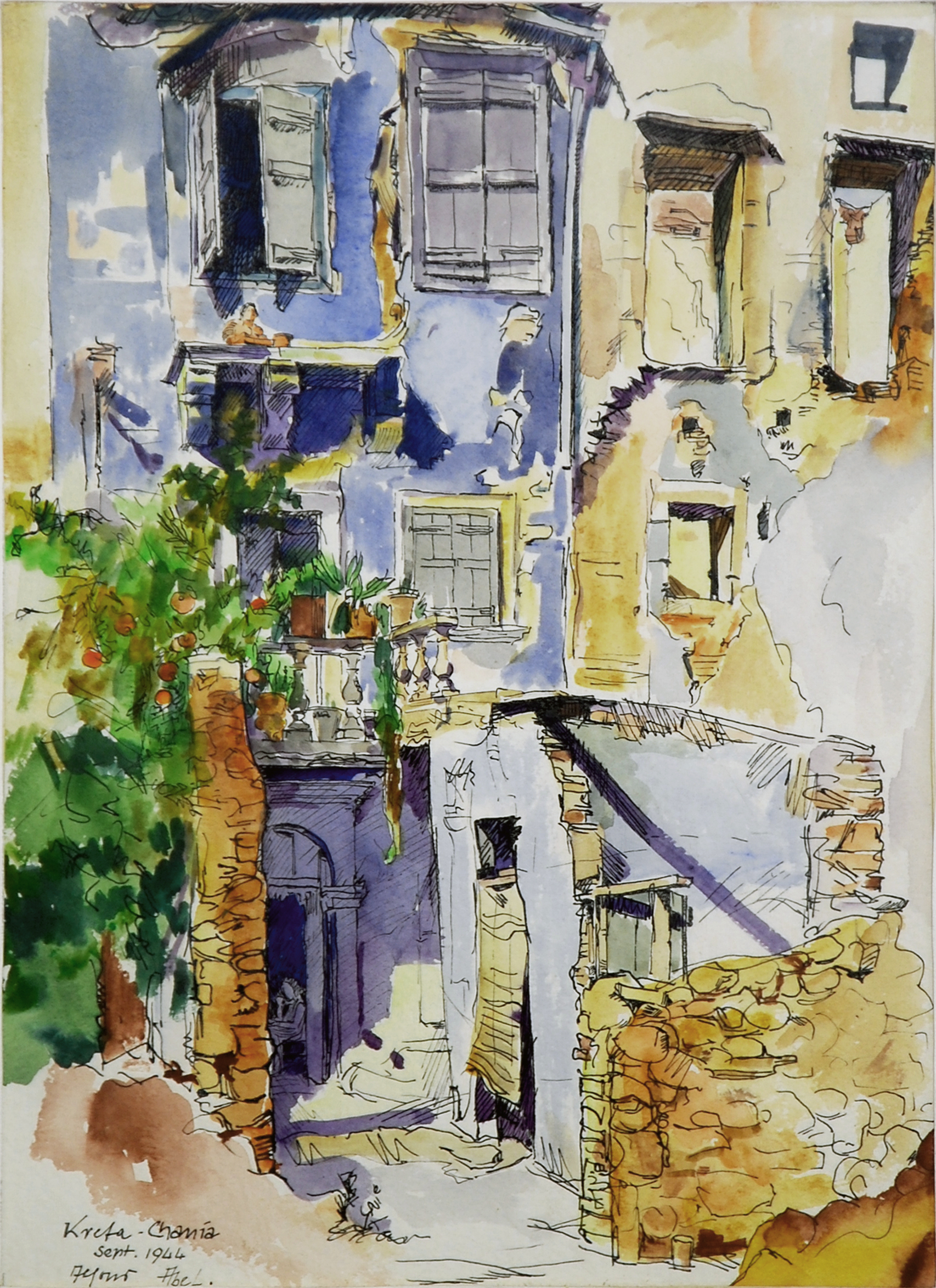 1944. Chania. Aquarell 34x24 cm Alfons Abel (1908–1994) DescriptionGerman stained-glass artist, painter and aquarellistDate of birth/death 19 January 1908 28 June 1994Location of birth/death Nuremberg NurembergWork location Nuremberg (1925), Munich (1928-1929), Berlin (1929-1931), Nuremberg (1931-....), Sofia (1934), Crete (1942-1946), Egypt, Cairo, Nuremberg (1947-1994), GreeceAuthority control : Q1636988 VIAF: 695148814287645330004 GND: 1126121169 creator QS:P170,Q1636988